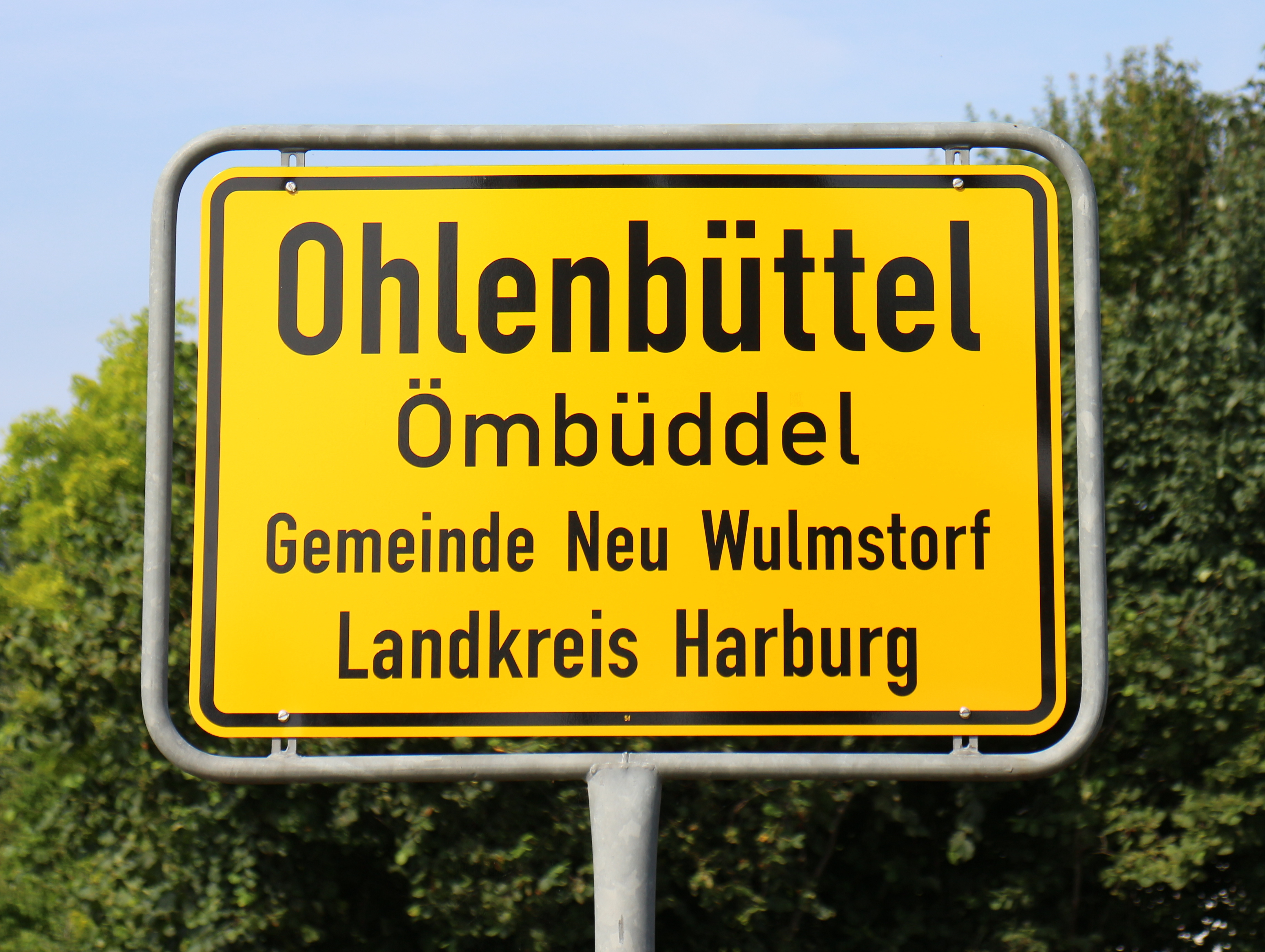 Ortsschild Ohlenbüttel